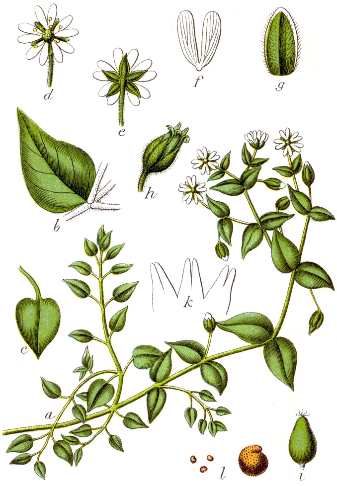 Stellaria aquatica (L.) Scop., syn. Myosoton aquaticum (L.) Moench, Alsine aquatica (L.) Britton Original Caption Weich-Miere, Alsine aquatica